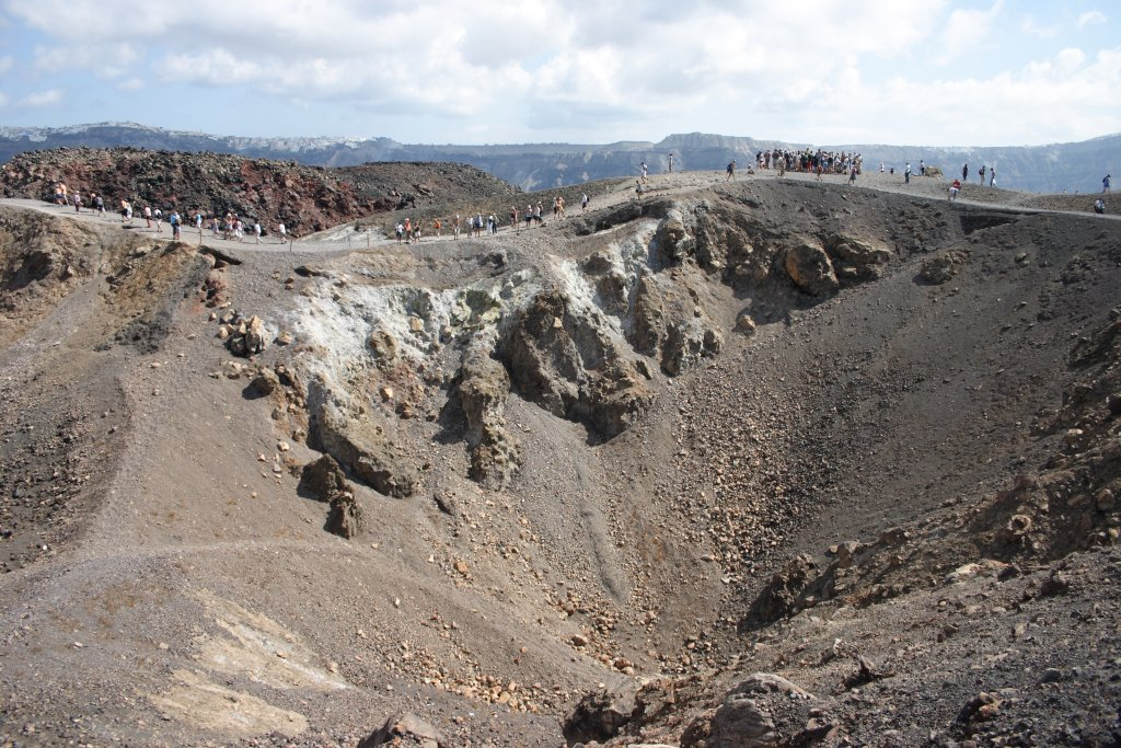 Santorini, Nea Kameni